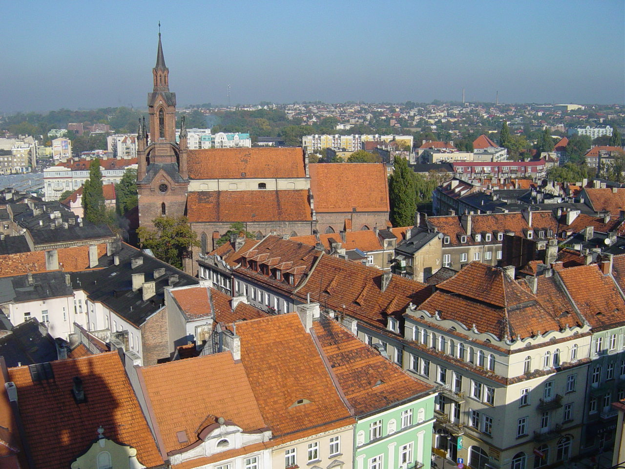 PANORAMA Z RATUSZOWEJ WIEŻY 01